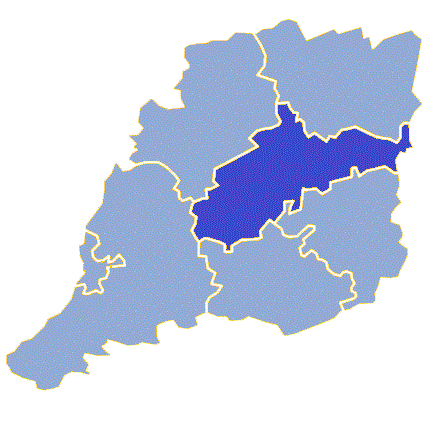 Powiat krośnieński (województwo lubuskie) - Gmina Krosno Odrzańskie